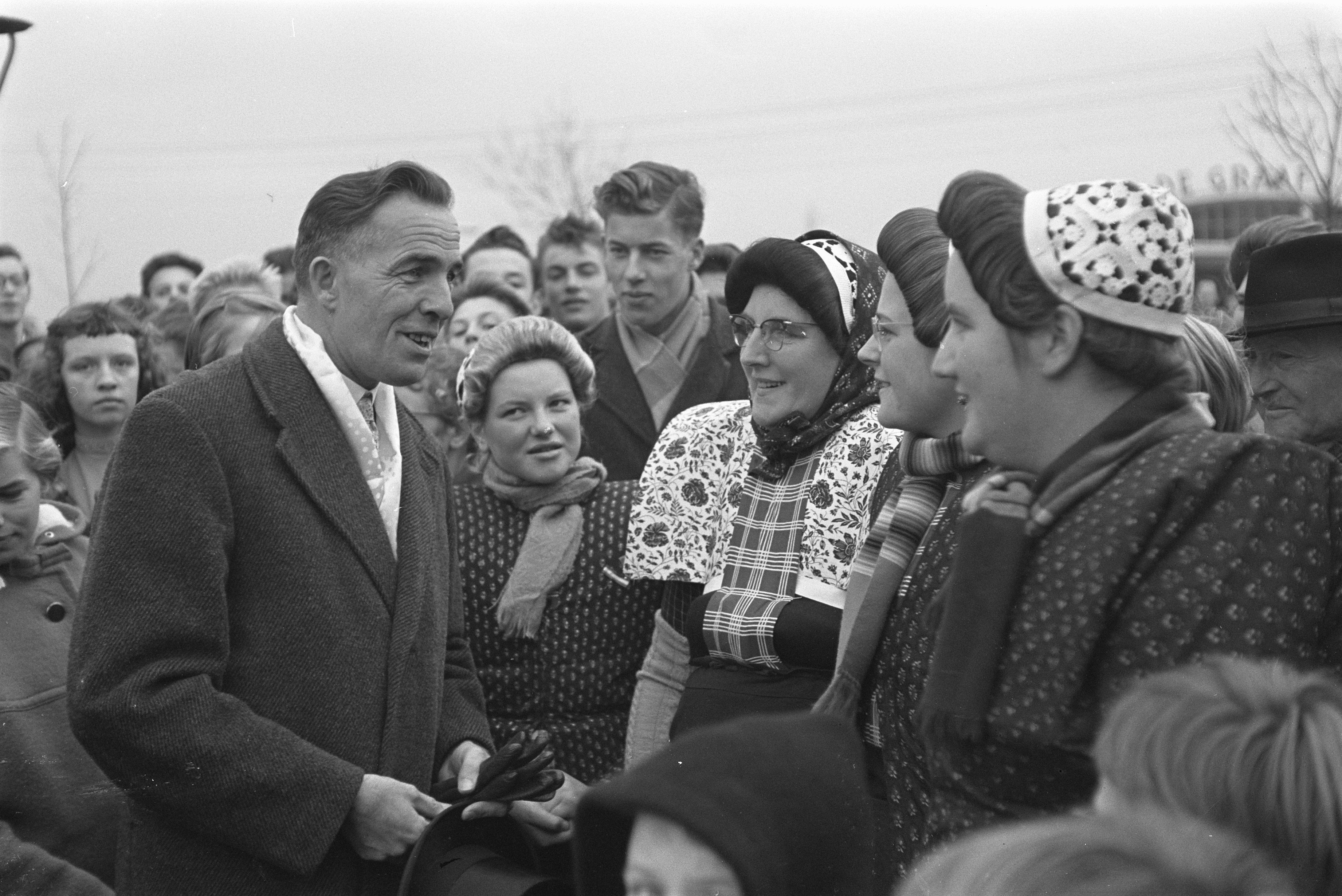 Collectie / Archief : Fotocollectie Anefo Reportage / Serie : [ onbekend ] Beschrijving : Installatie nieuwe burgemeester Bunschoten W. van de Heide Datum : 18 november 1959 Locatie : Bunschoten Trefwoorden : Installatie, burgemeesters Persoonsnaam : W. van de Heide Fotograaf : Pot, Harry / Anefo Auteursrechthebbende : Nationaal Archief Materiaalsoort : Negatief (zwart/wit) Nummer archiefinventaris : bekijk toegang 2.24.01.05 Bestanddeelnummer : 910-8333